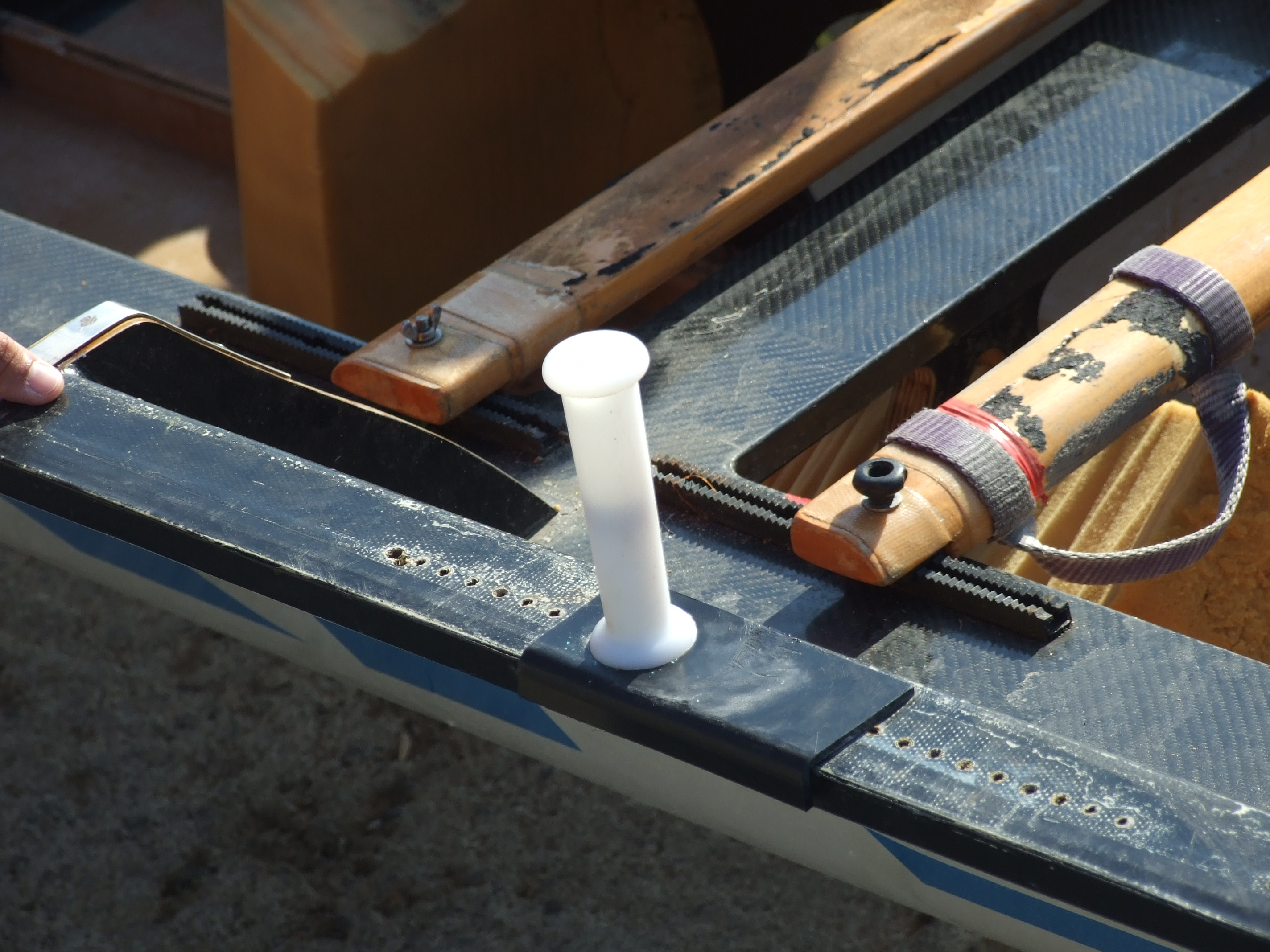 Tolete de trainera en San Vicente de la Barquera